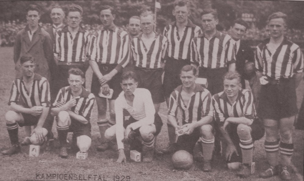 Het kampioenselftal van PSV in 1929